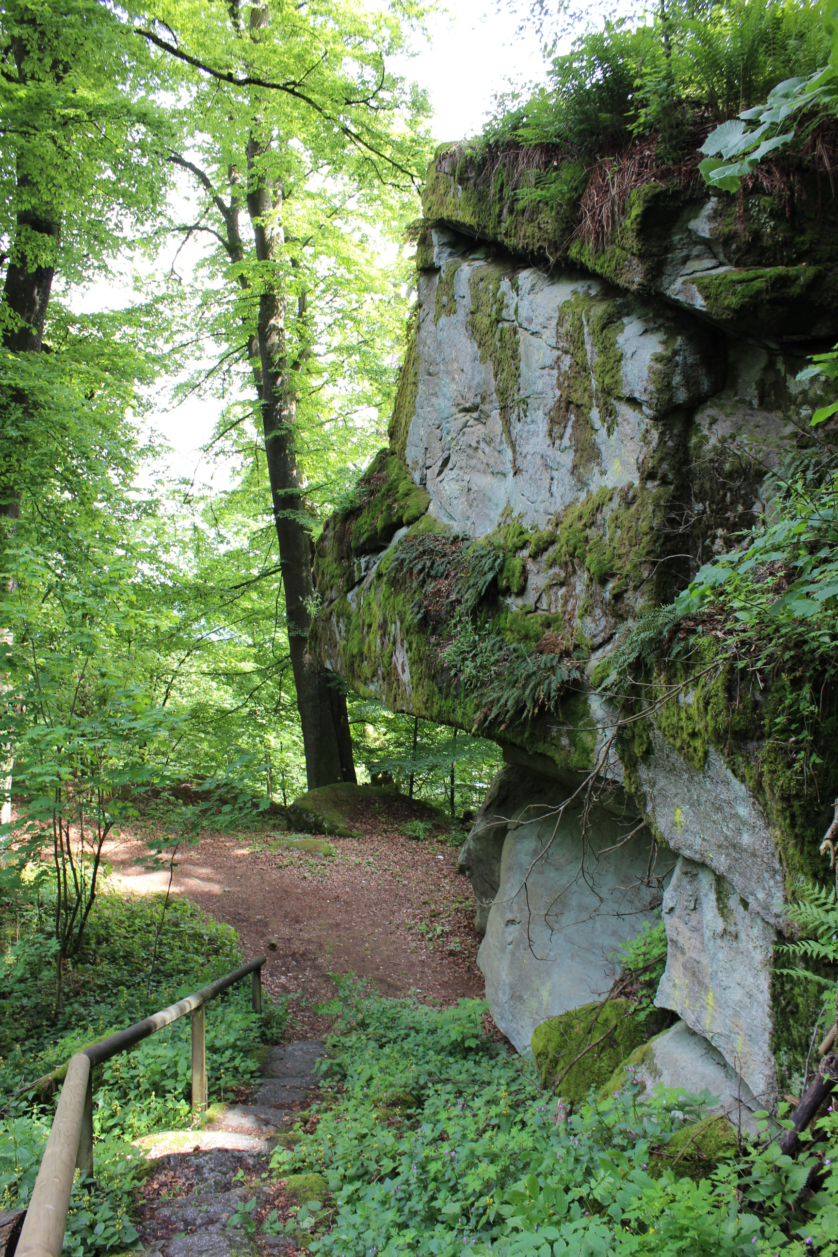 Felsen des Burgberges Falkenstein im Landkreis Cham, Oberpfalz. Geotop-Nr. 372R012.